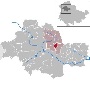 Issersheilingen in Thuringia - Unstrut-Hainich-Kreis